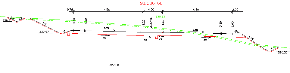 Příčný řez odřezem tělesa dálnice